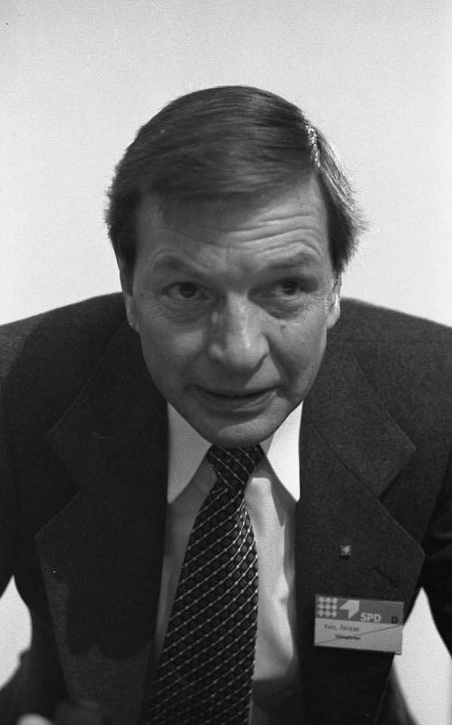 Außerordentlicher Parteitag der SPD im Messe-Kongreß-Zentrum in Köln zur Vorbereitung für die Europa-Parlament-Wahl 1979